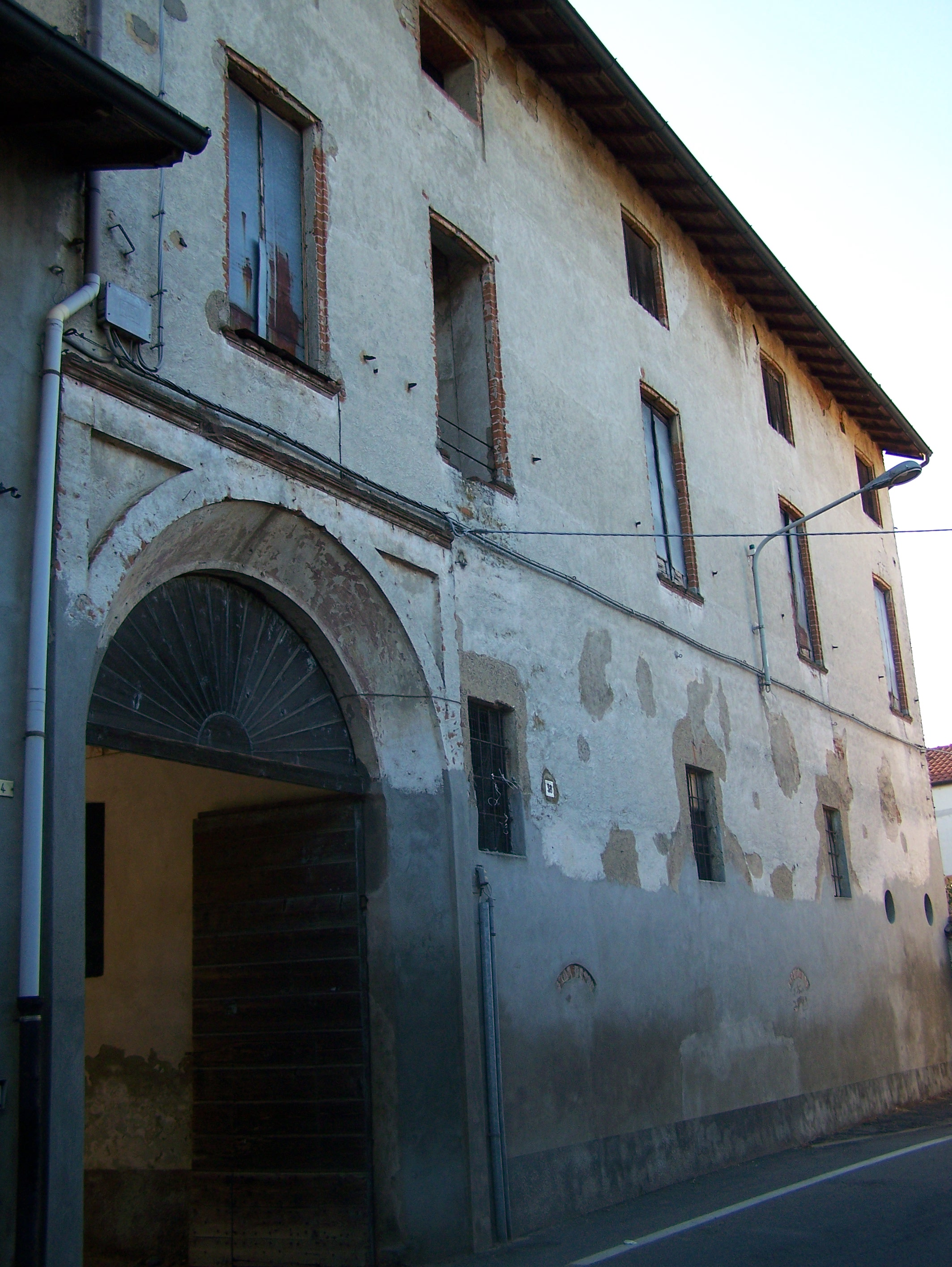 Palazzo Terzaghi a Bestazzo, frazione di Cistliano (MI) - Italy